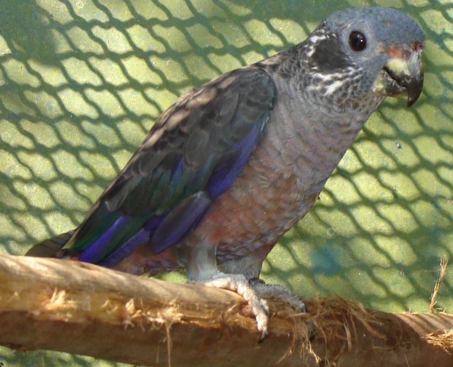 Pionus fuscus, vistoria do Ibama a criadouro